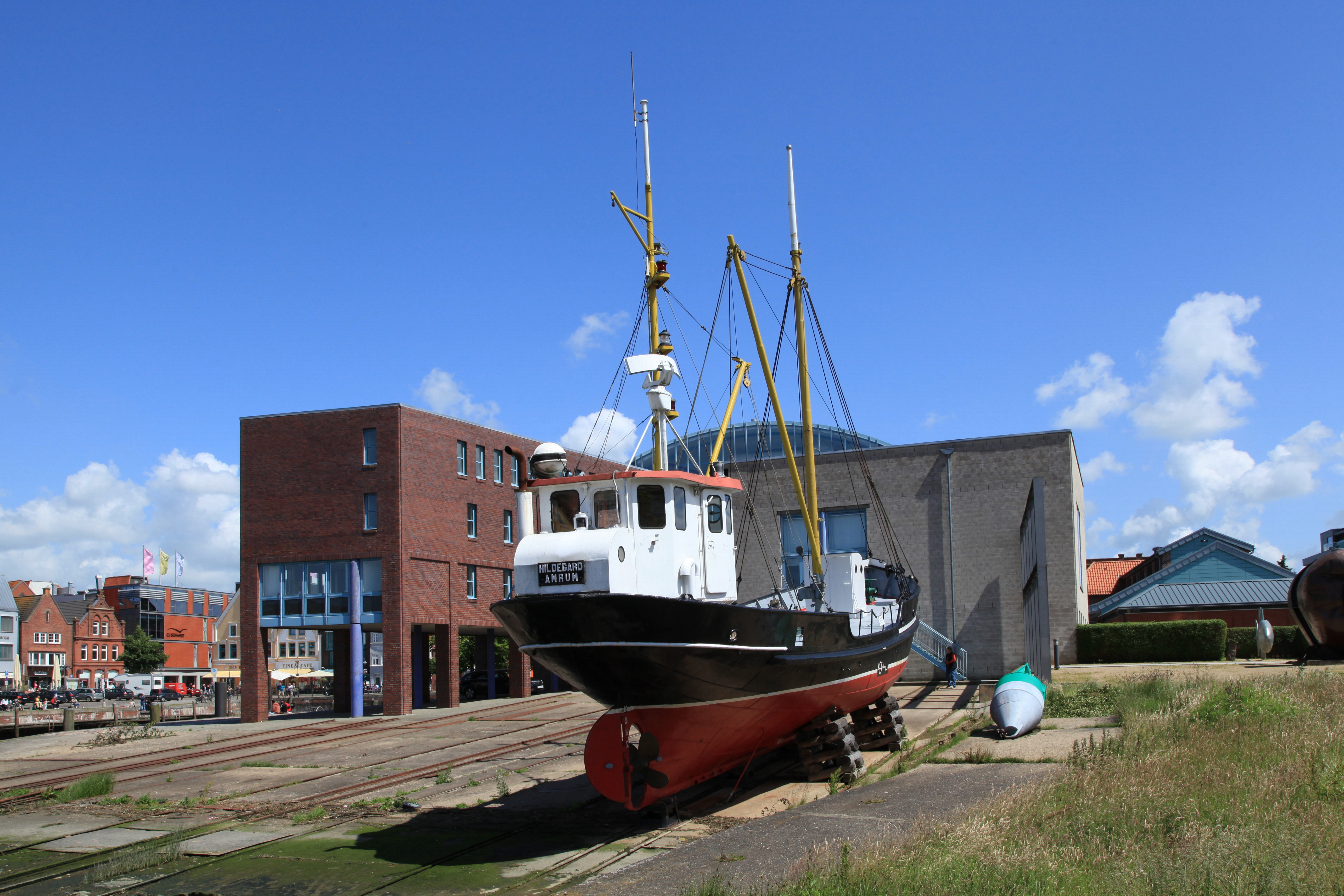 die Hildegard vor dem Rathaus, Am Binnenhafen in Husum